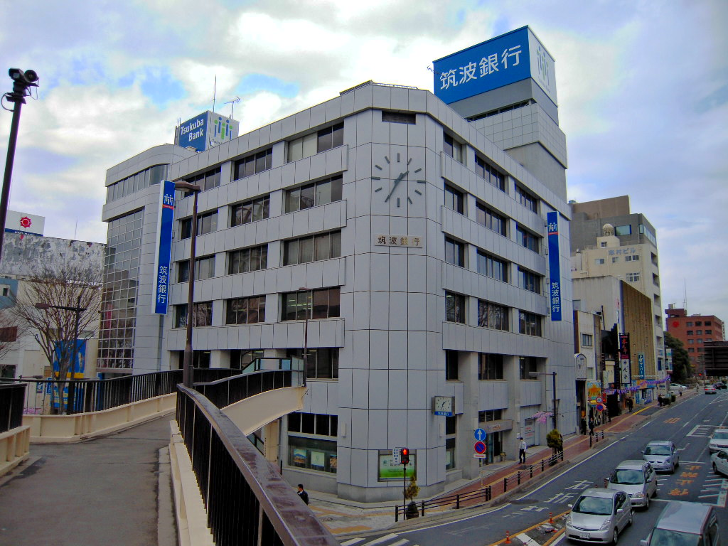 筑波銀行水戸営業部（旧茨城銀行本店）